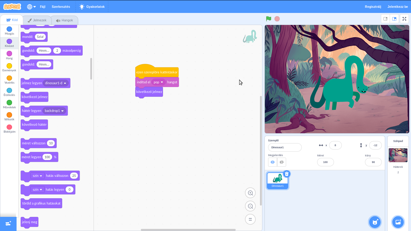 Scratch mintaprogram a legújabb verzióval készítve.